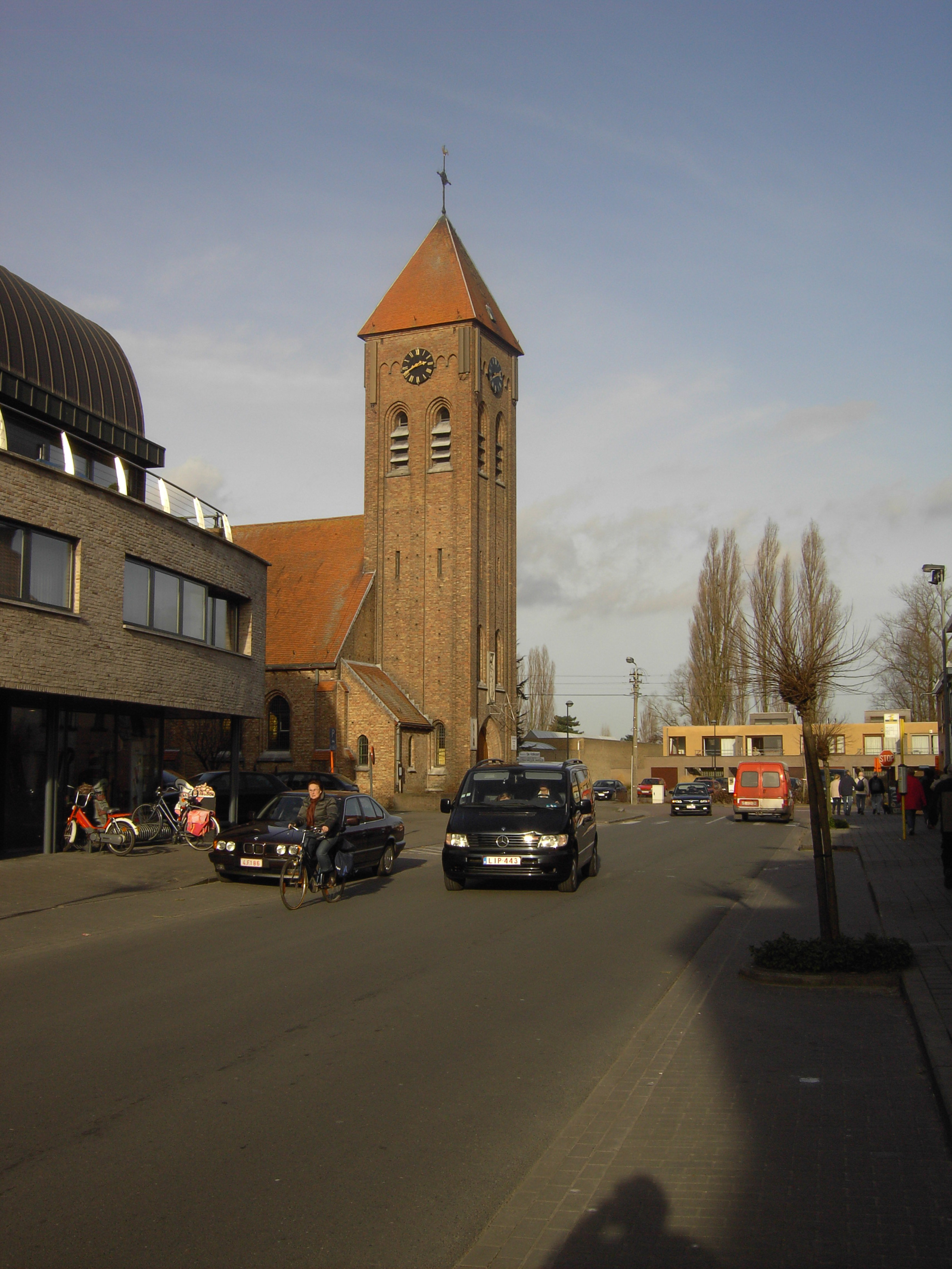 Moerbrugge (Oostkamp) - Belgium - Church